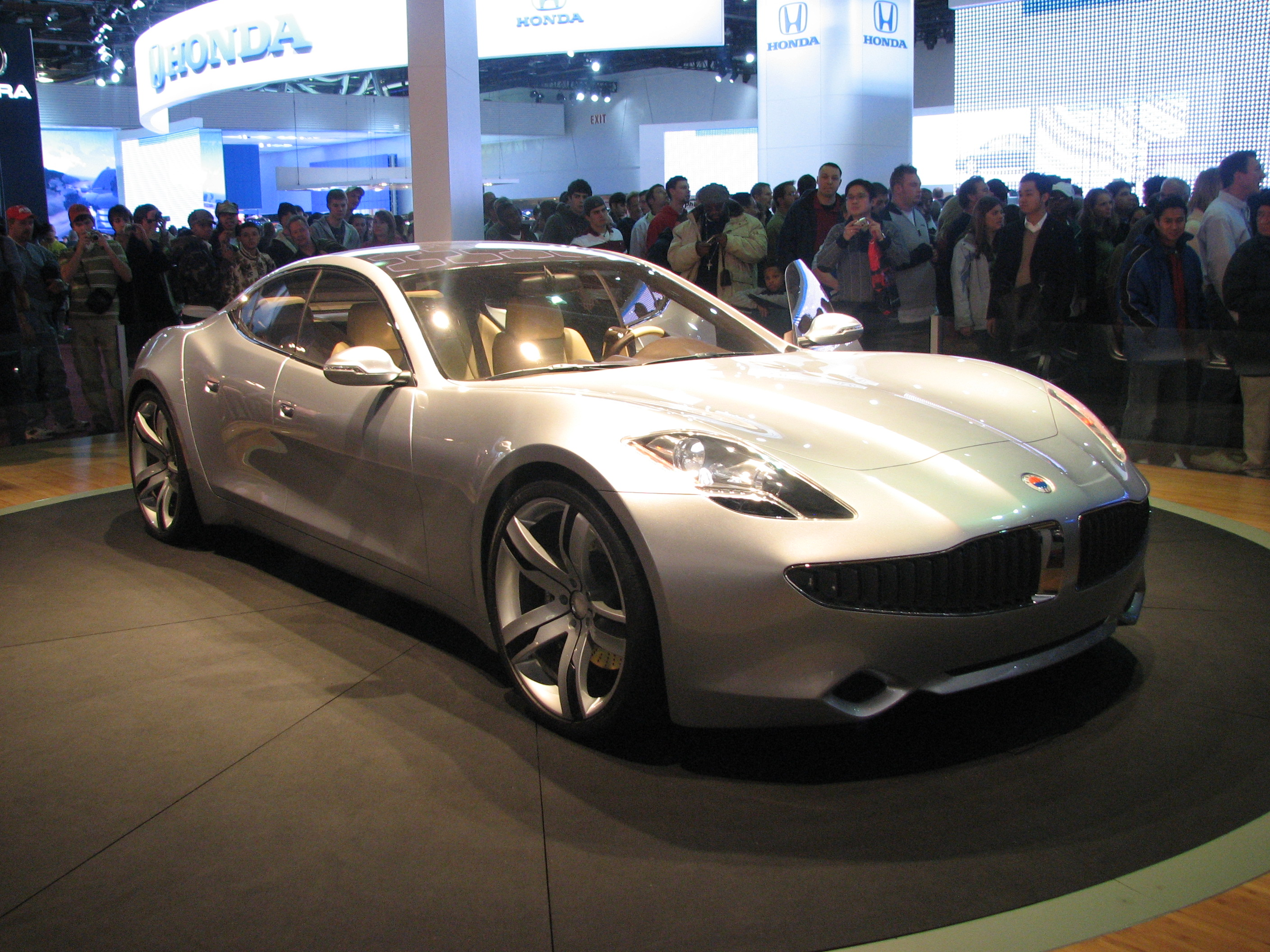 Fisker Karma @ Detroit Auto Show.